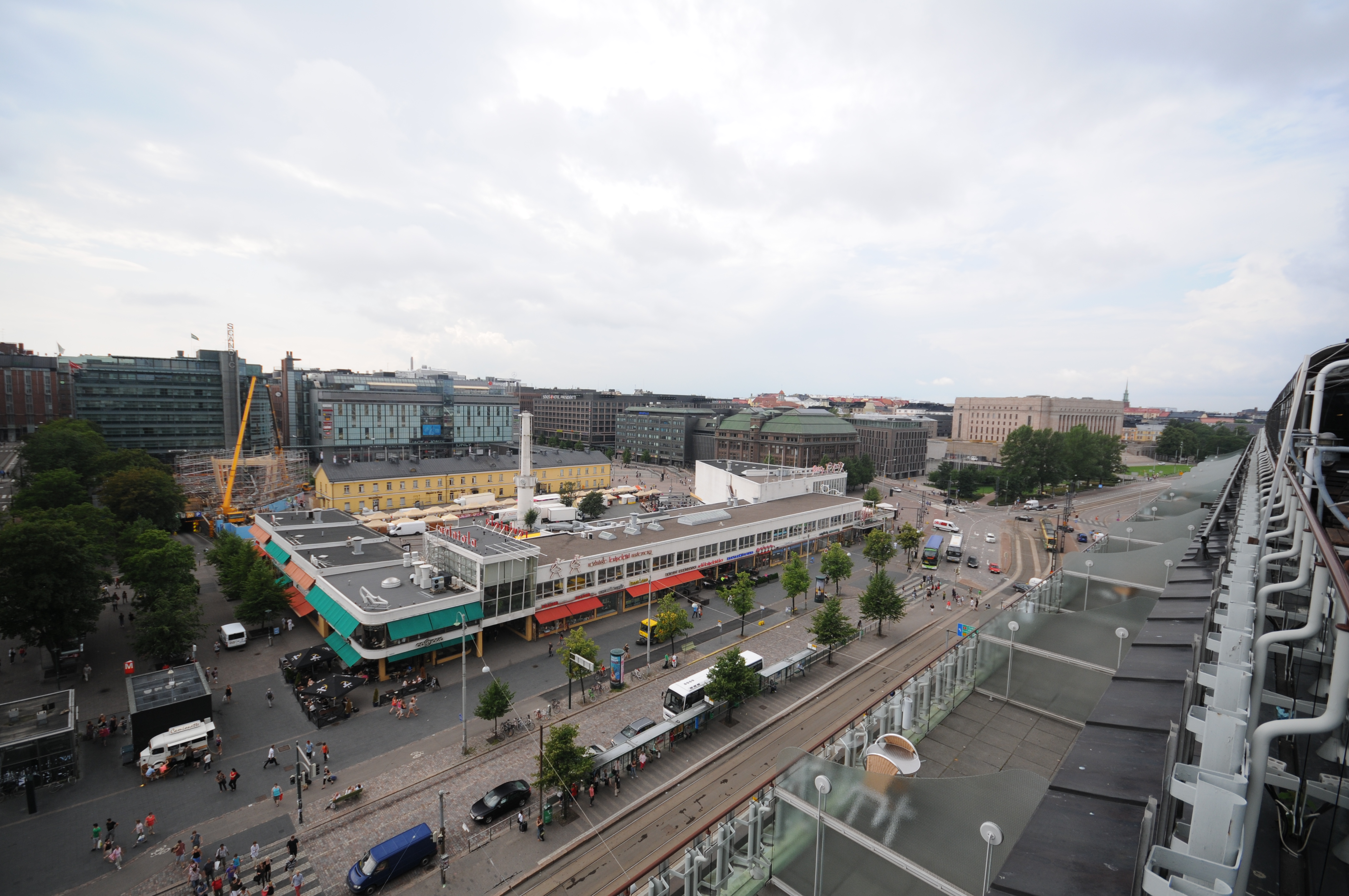 Helsinki